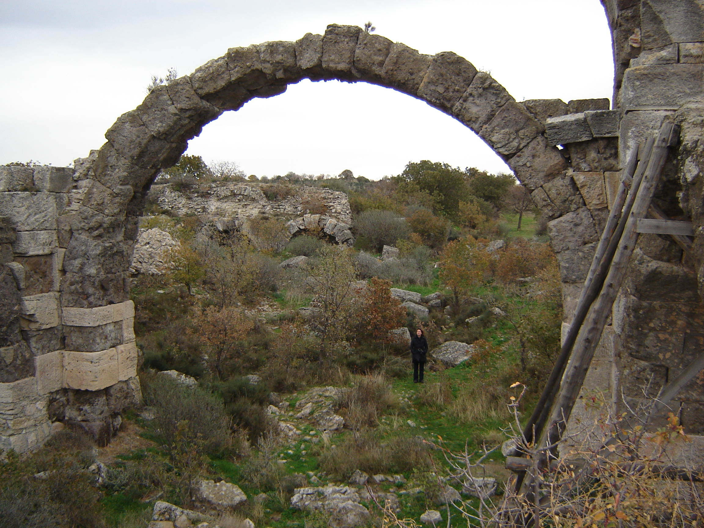 Aleaxandria Troas Therme